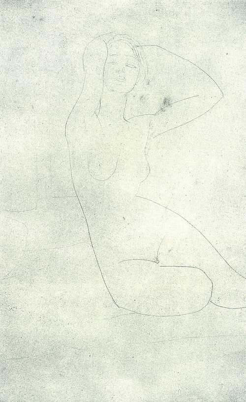 Aktzeichnung